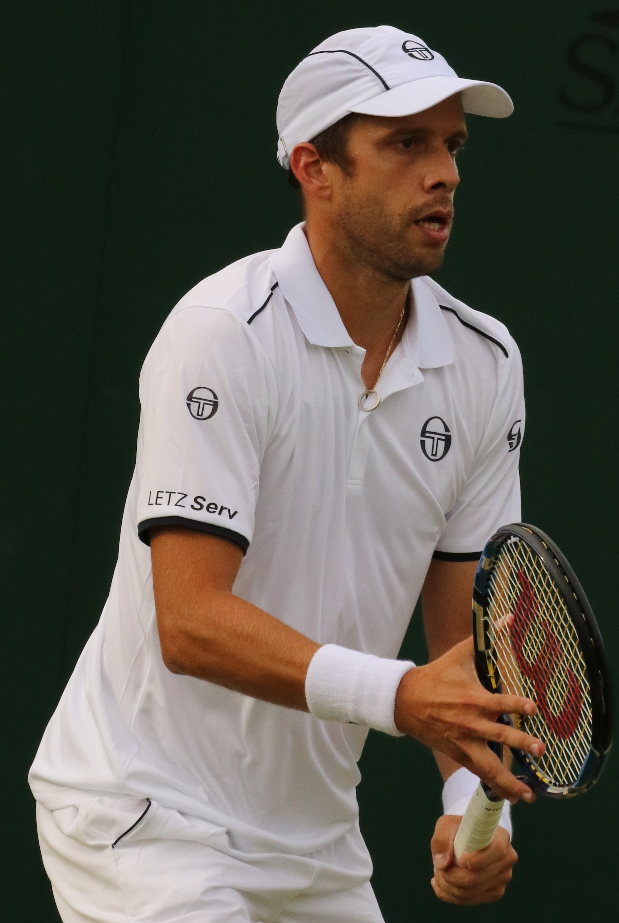 Muller WM16 (5)